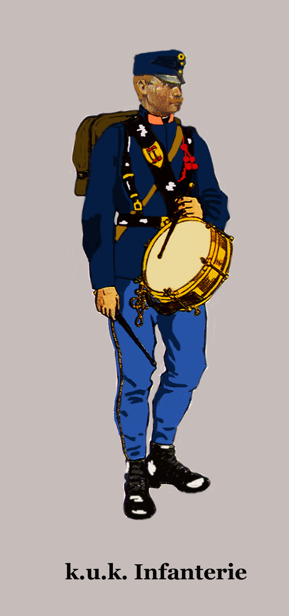 k.u.k. Infanterietambour in ungarischer Uniform (Marschadjustierung vor 1908)